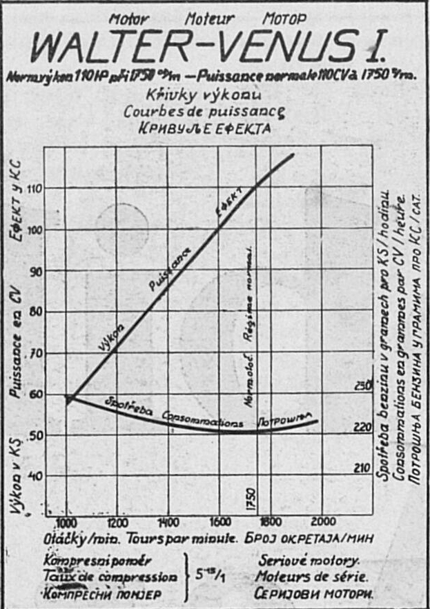 Walter Venus (charakteristiky)